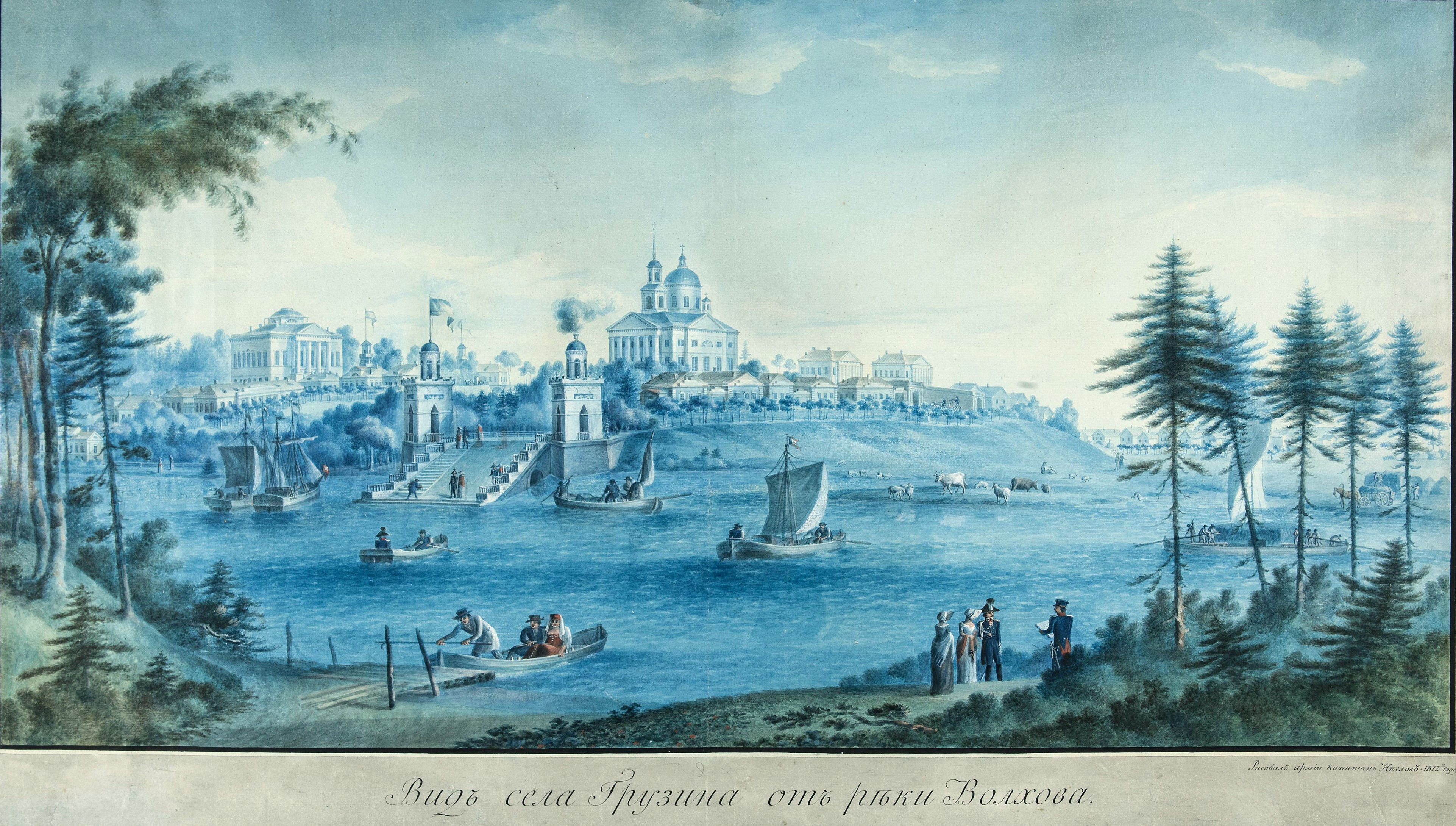 Виды села Грузино